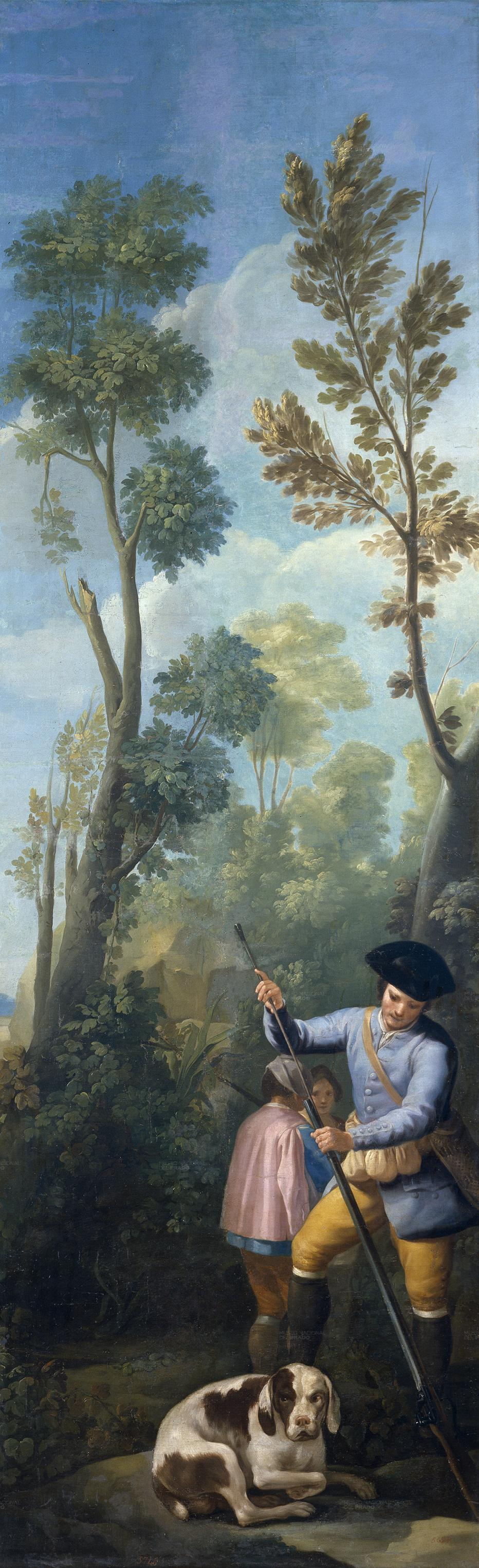 Cazador cargando su escopeta. Cartones parra tapices. Óleo sobre lienzo. 289 × 90 cm. Madrid, Museo del Prado.